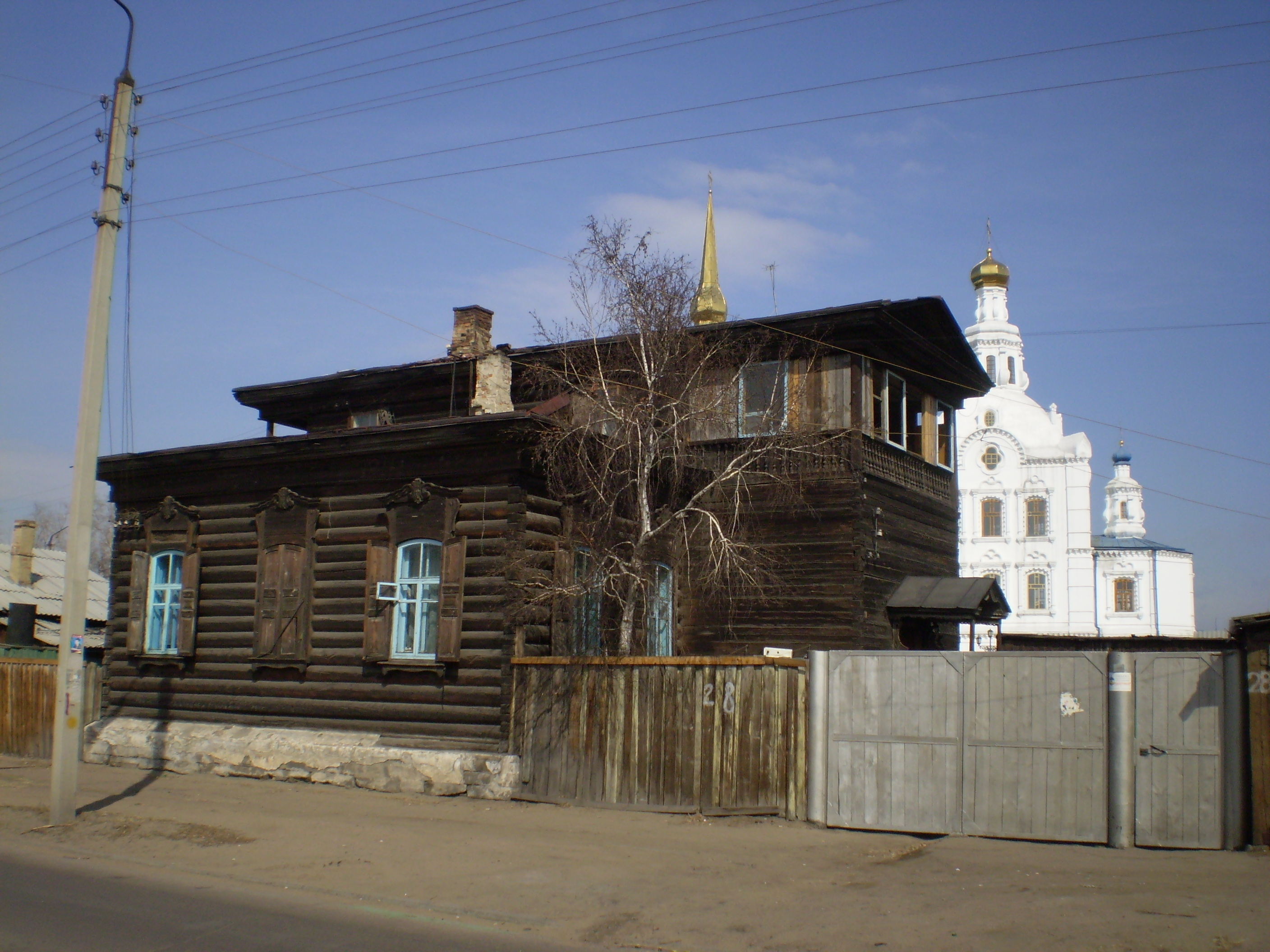 Улан-Удэ. Ул. Набережная 28. Памятник архитектуры